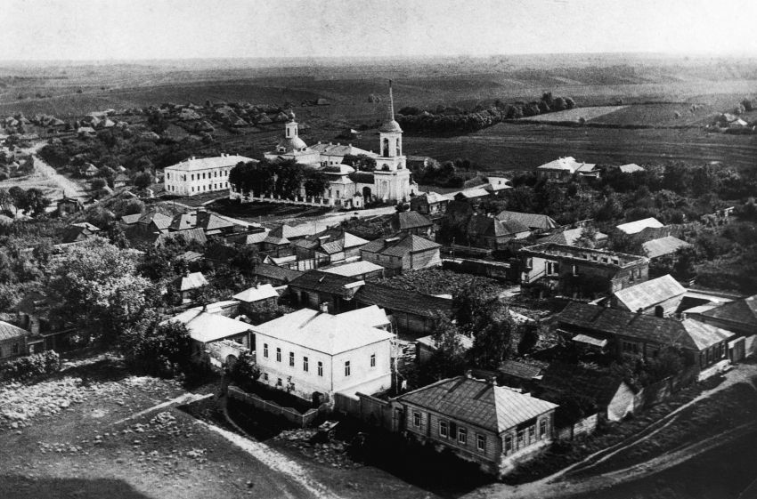 Белёв. Церковь Воскресения Словущего